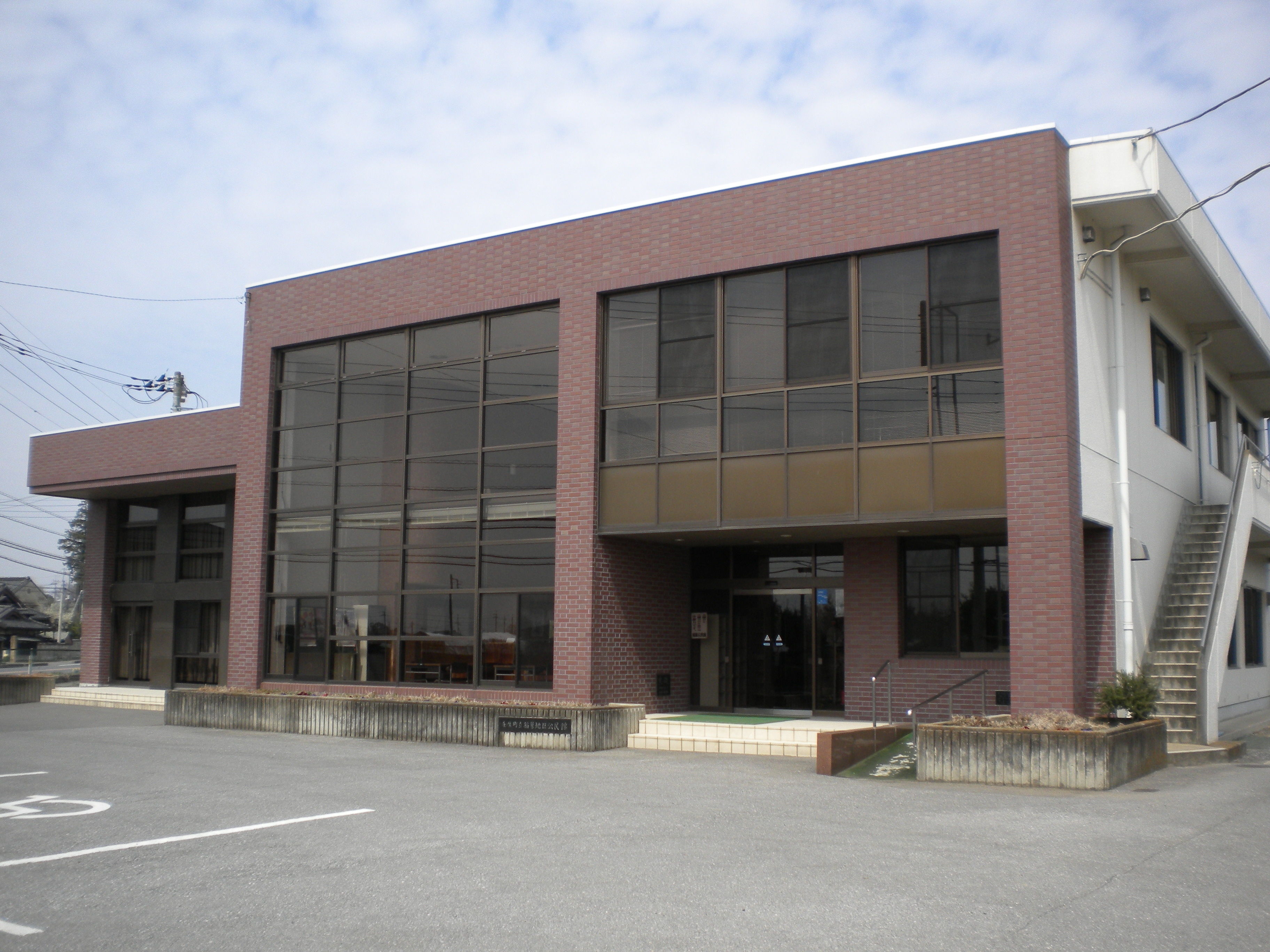 栃木県下都賀郡壬生町大字上稲葉 壬生町稲葉地区公民館